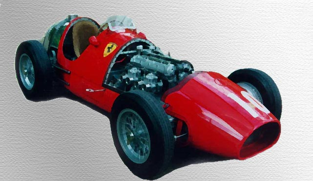 Ferrari 500, model folosit în 1952. Boarisch: Ferrari 500, 1953.